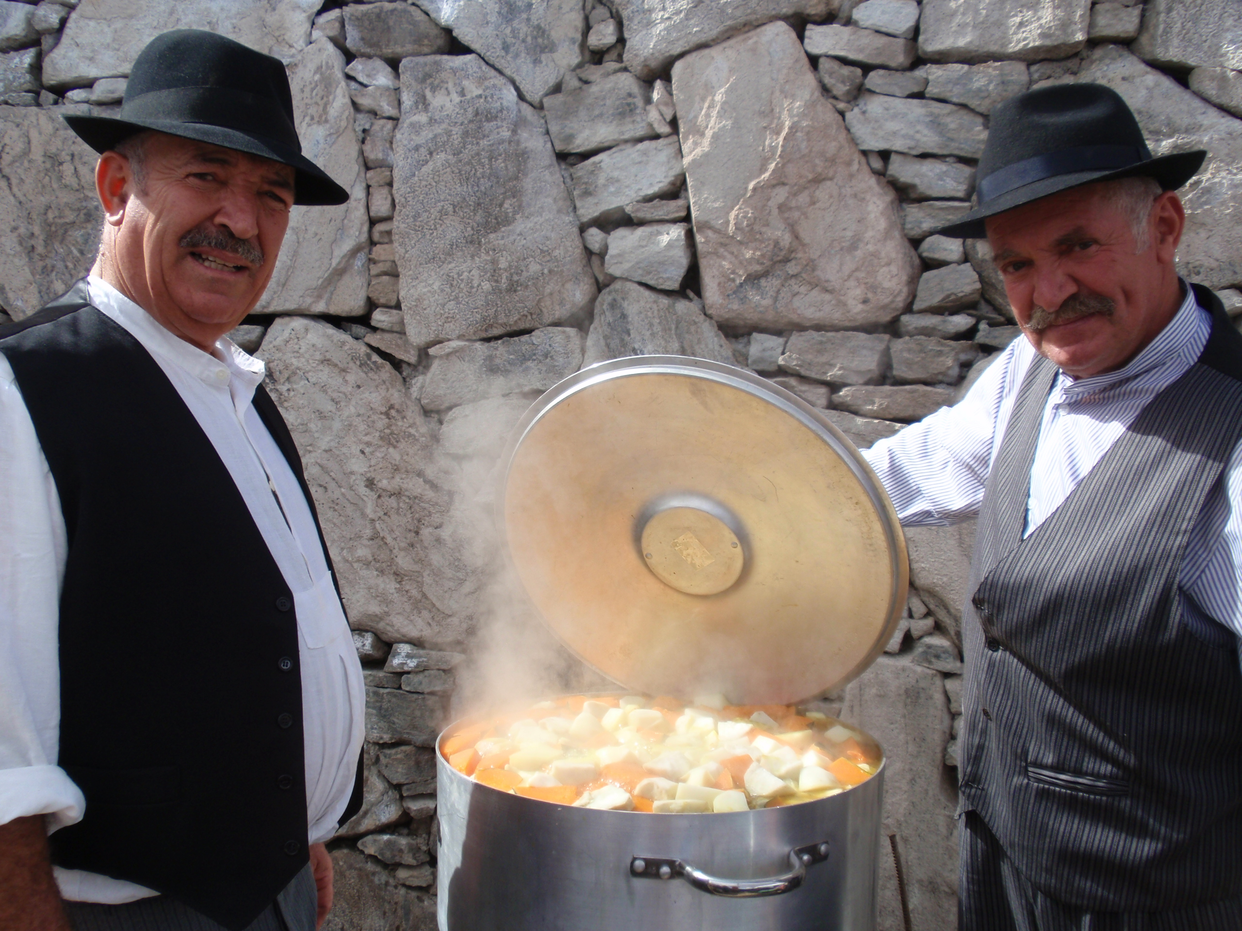 Puchero Canario 2010